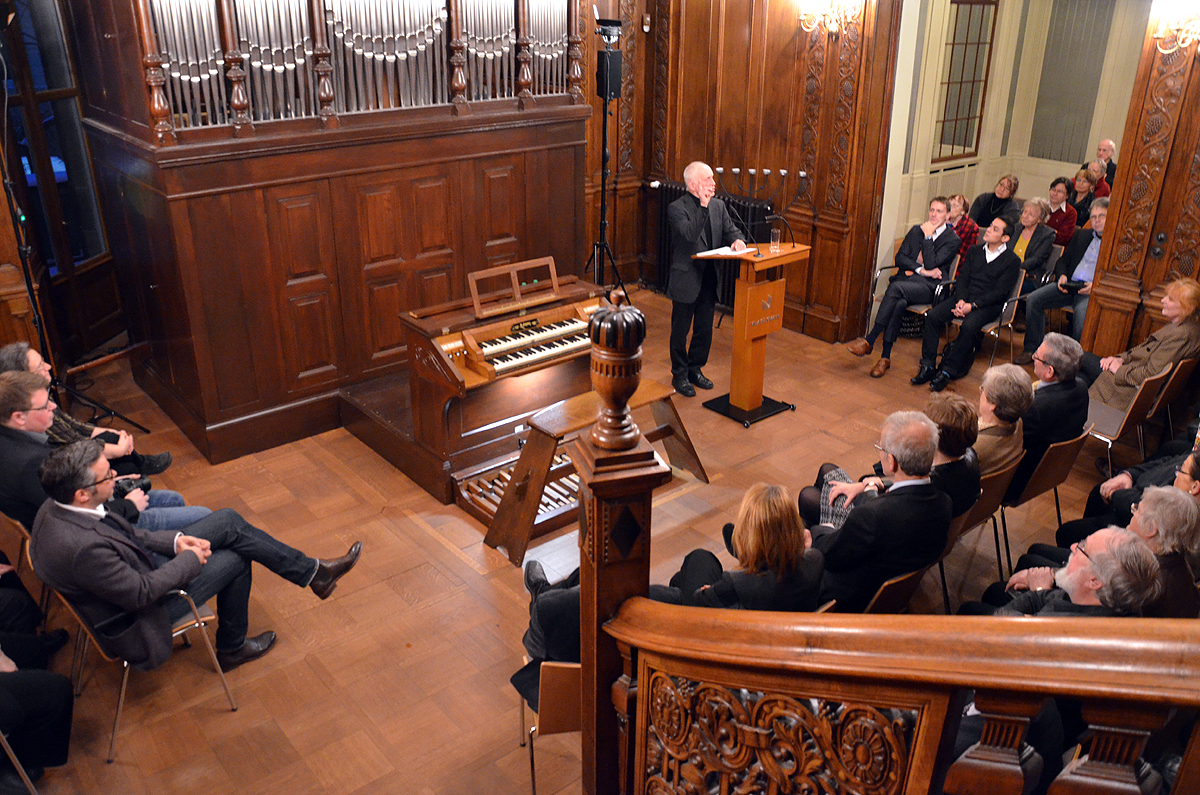 Zur Eröffnung von Bet Tfilas Wanderausstellung Synagoge und Tempel in der Villa Seligmann hielt Professor Harmen Thies einen Einführungsvortrag vor den Gästen ...